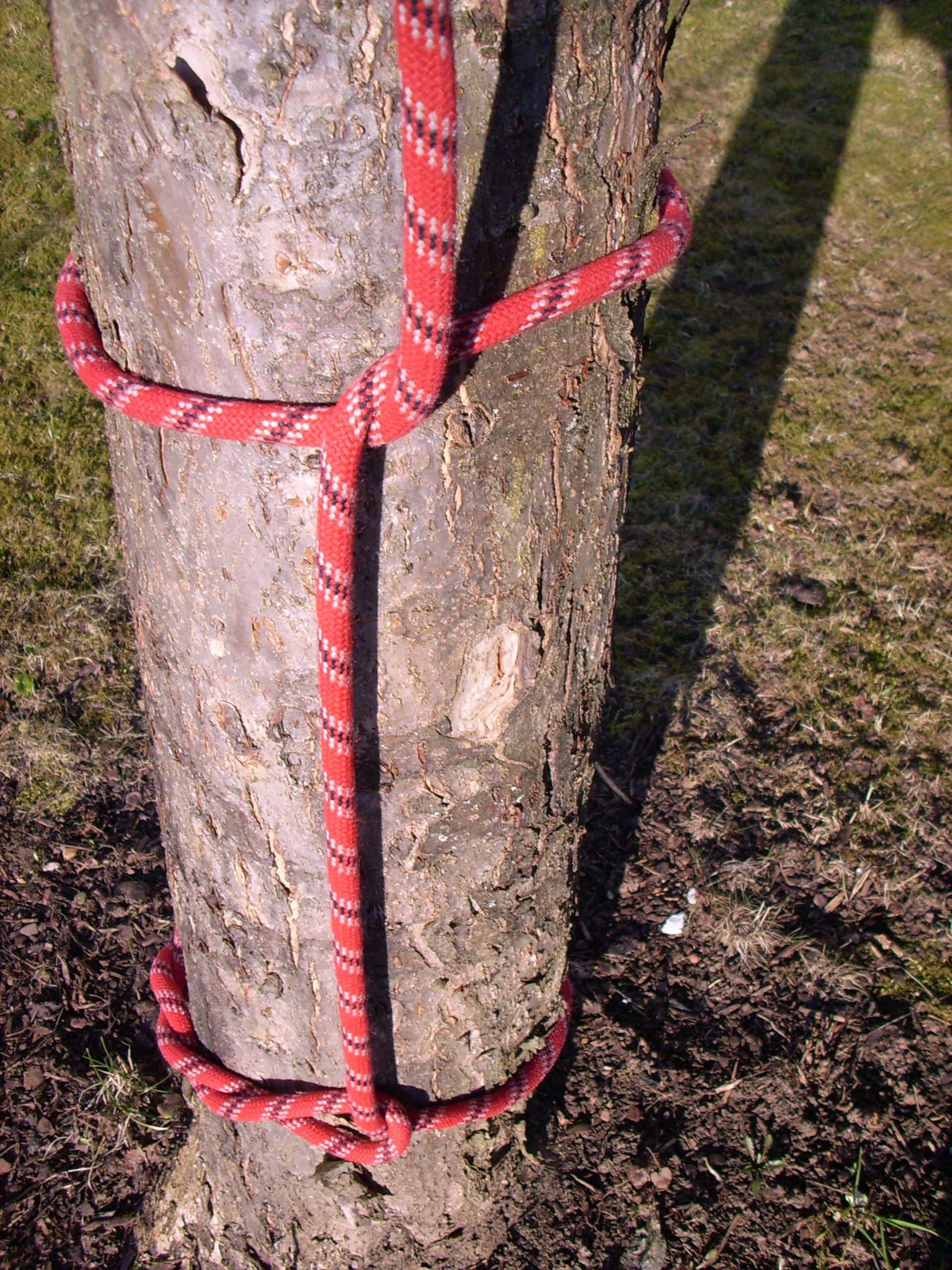 Zimmermannsknoten mit halbem Schlag, zum Transport von Balken oder anderer langer Gegenstände